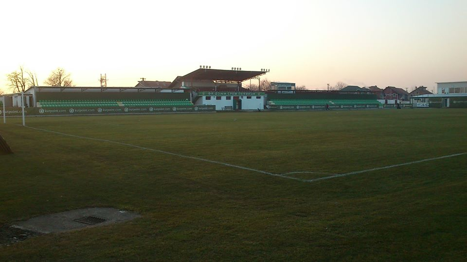 Stadion Suvača u Pećincima